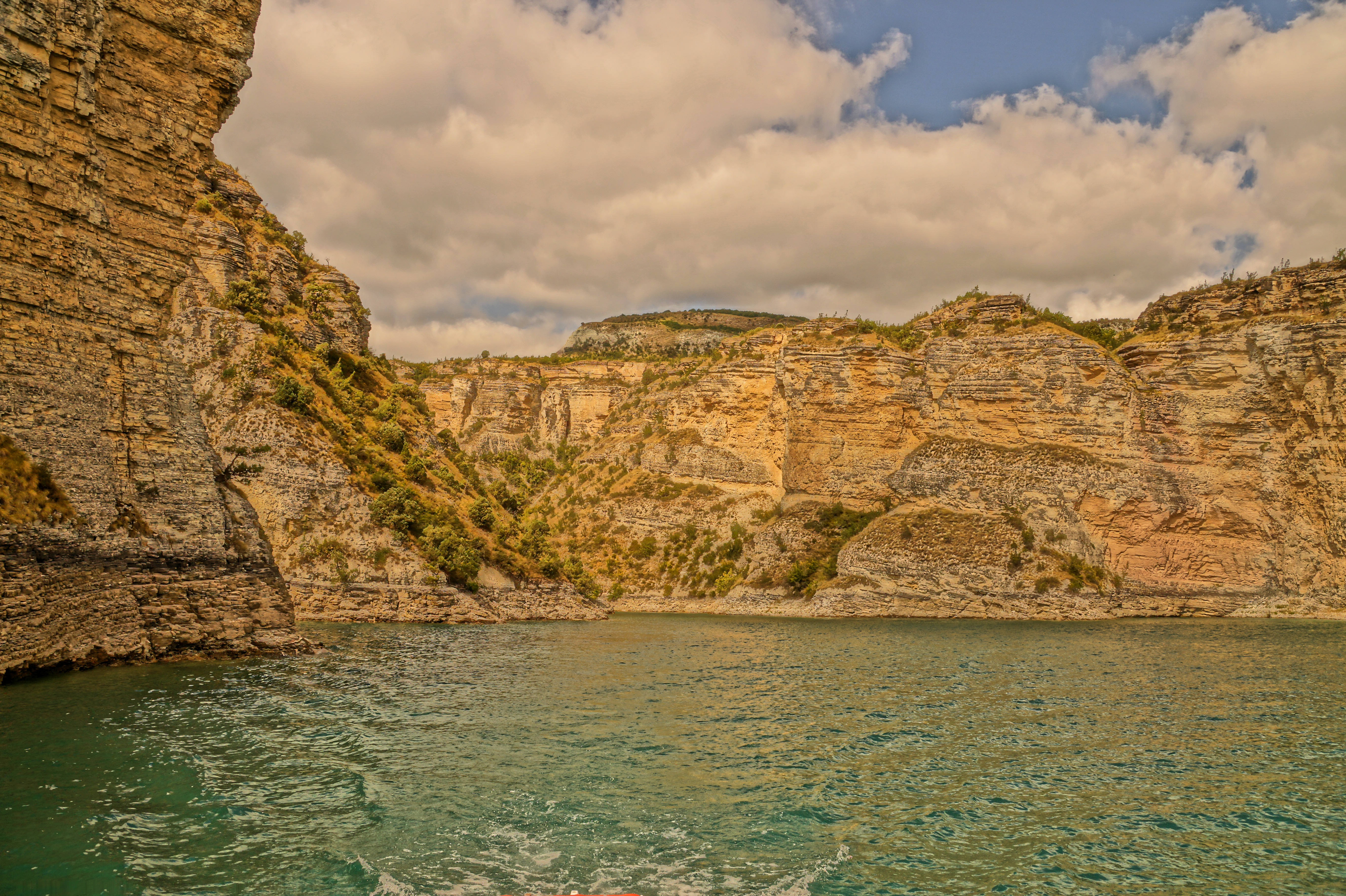 Мелиштинский заказник: Границы: северная - ГЭС 'Чиркей', восточная - побережье Чиркейского водохранилища, южная - хребет Салатау, западная - административная граница Казбековского р-на, Буйнакский район, Дагестан This image is related to the protected area of Russia number 0510006